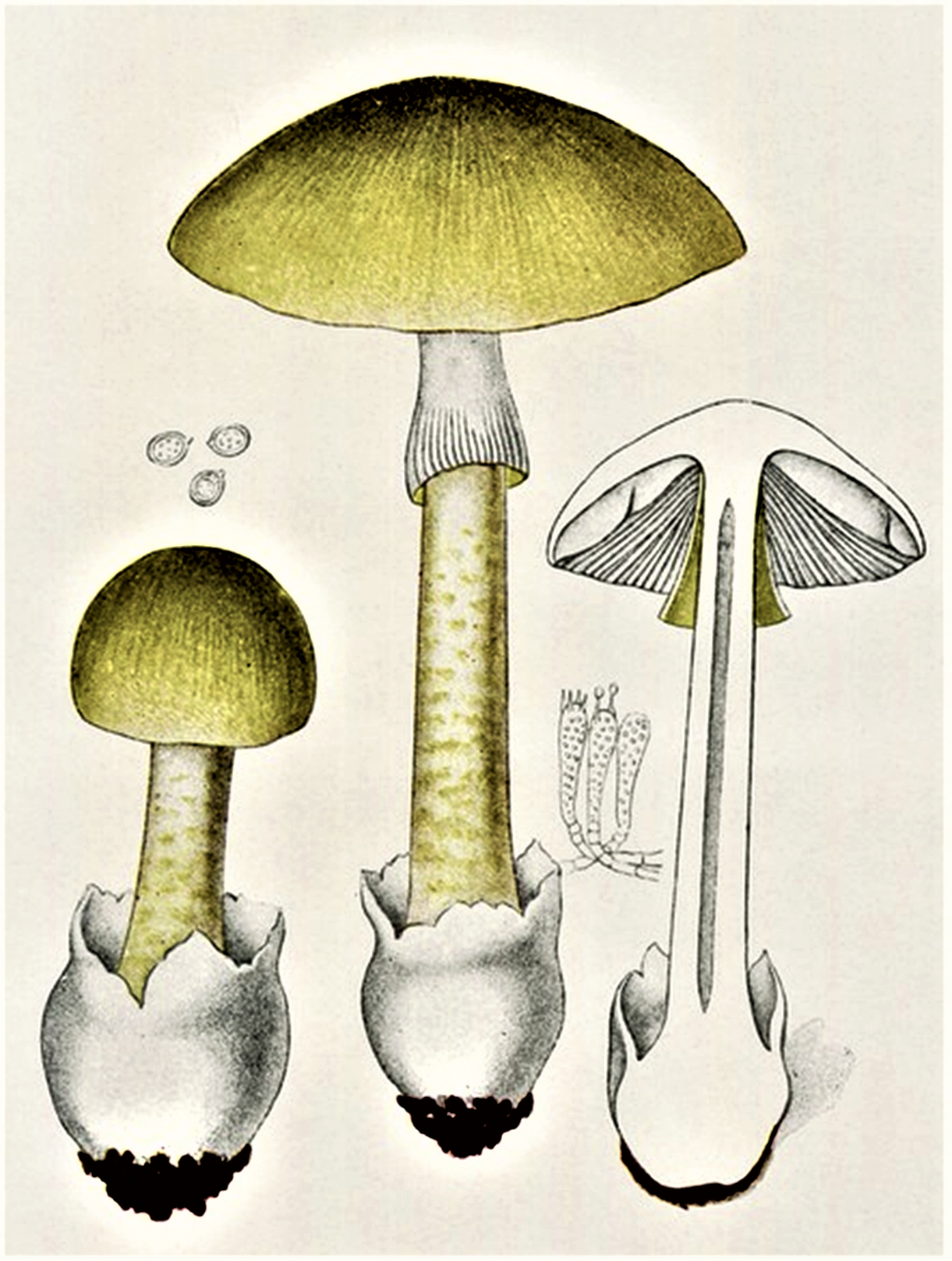 Giacomo Bresadola: Amanita phalloides